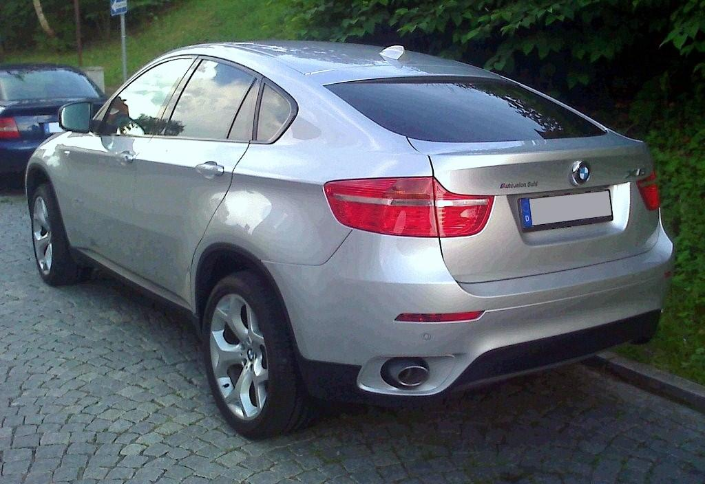 BMW X6